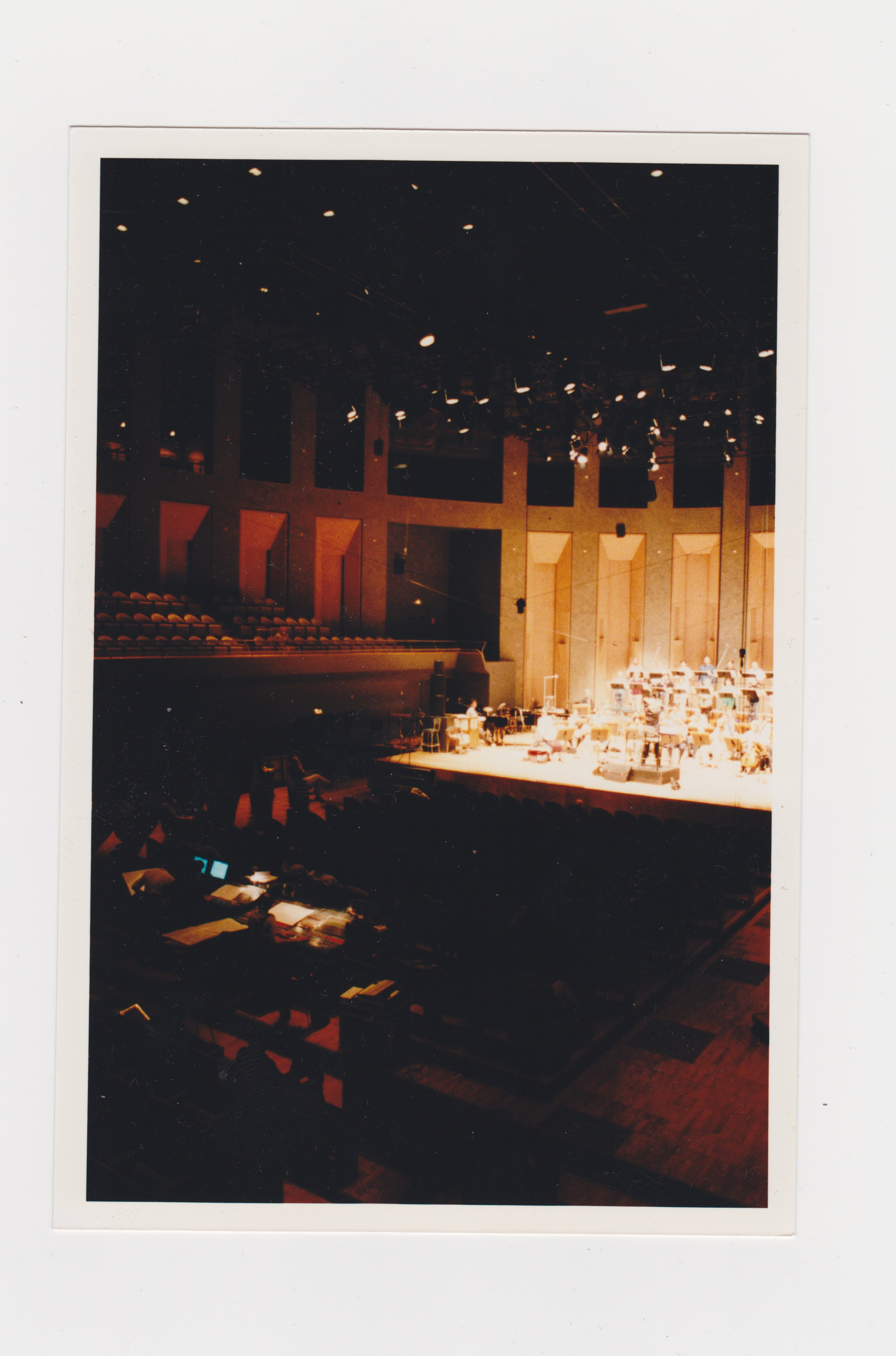 Oratorio pour choeur mixte, matériaux electroniques spatialisés et orchestre.